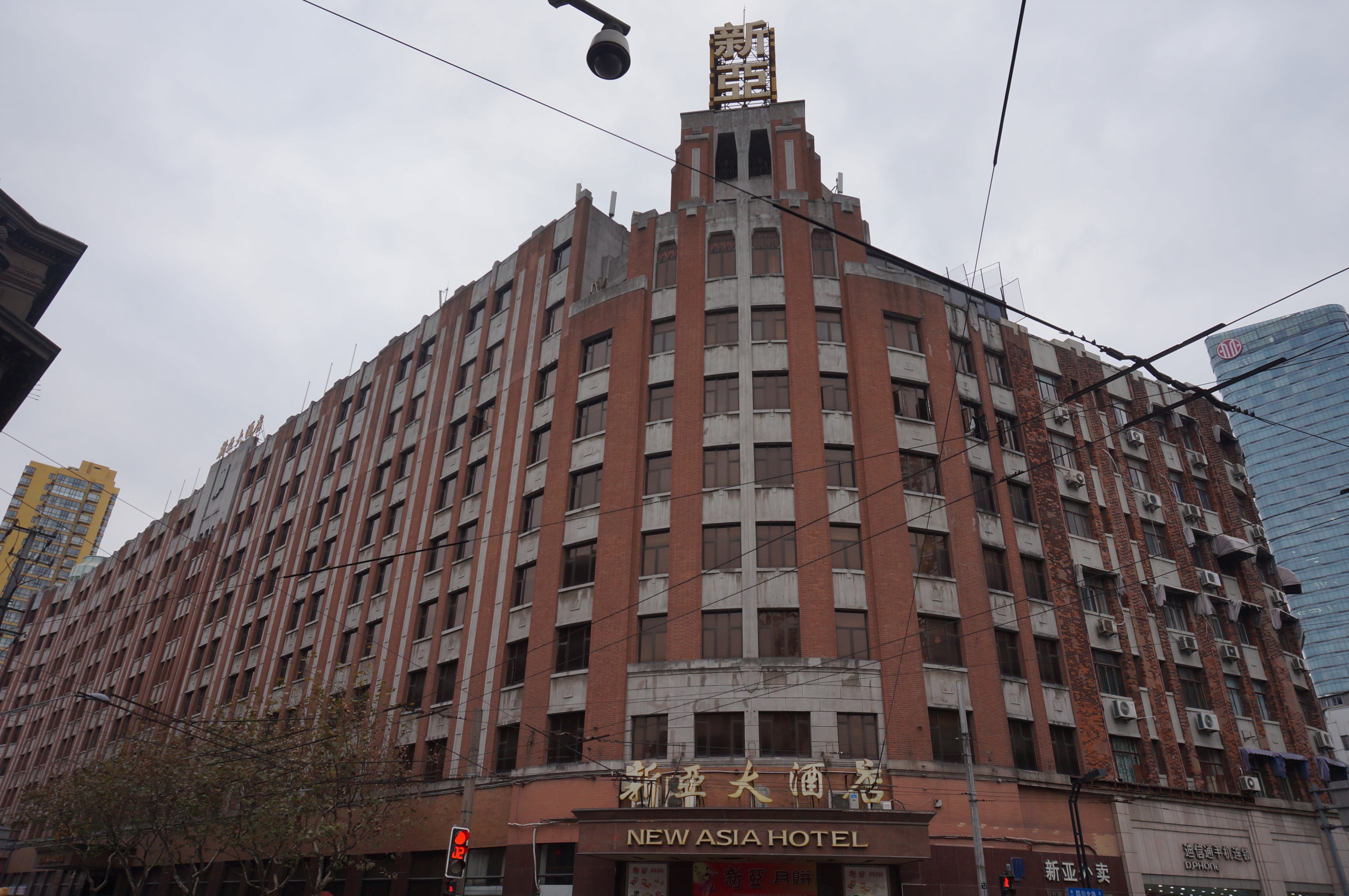 上海新亚酒店